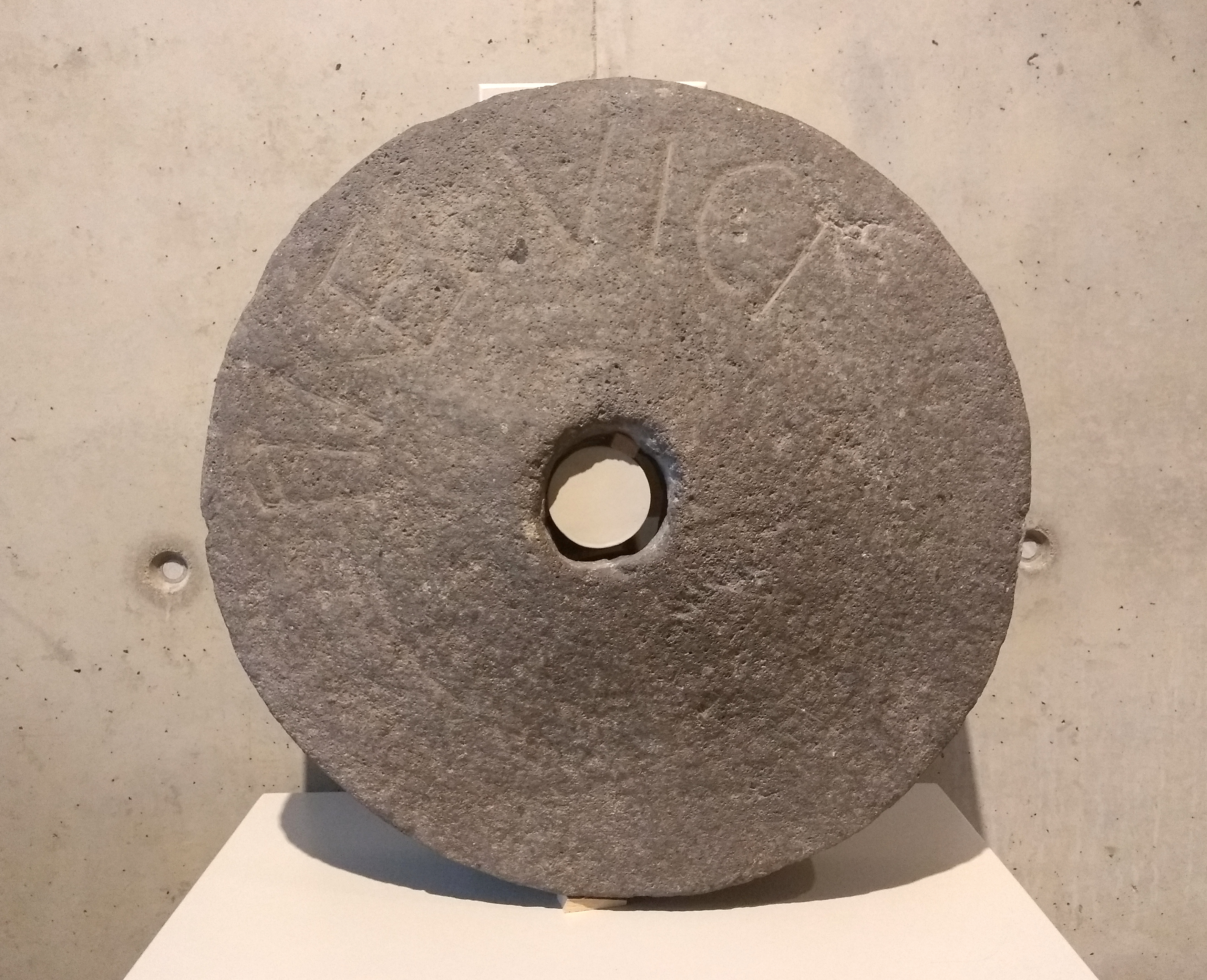 Römischer Mühlstein mit Inschrift "Fines Vici"